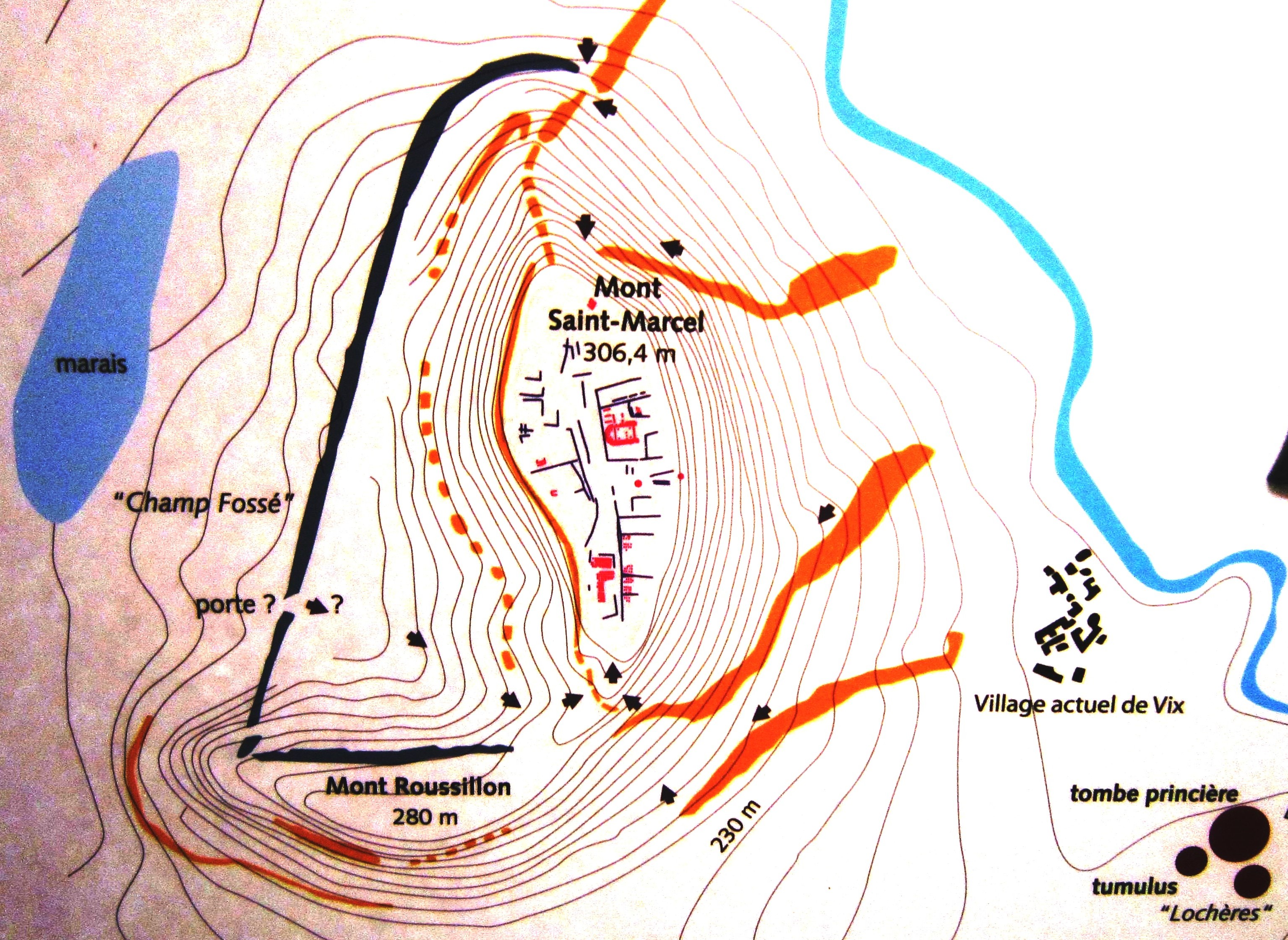 Plan de la cité du mont Lassois (musée de Châtillon-sur-Seine